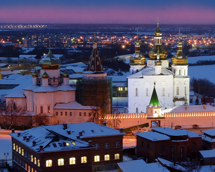 La monaĥejo de la Sankta Triunio: maldesktre la preĝejo de la sanktuloj Petro kaj Paŭlo, dekstre - la Troickij katedralo (Tjumeno, Rusio)